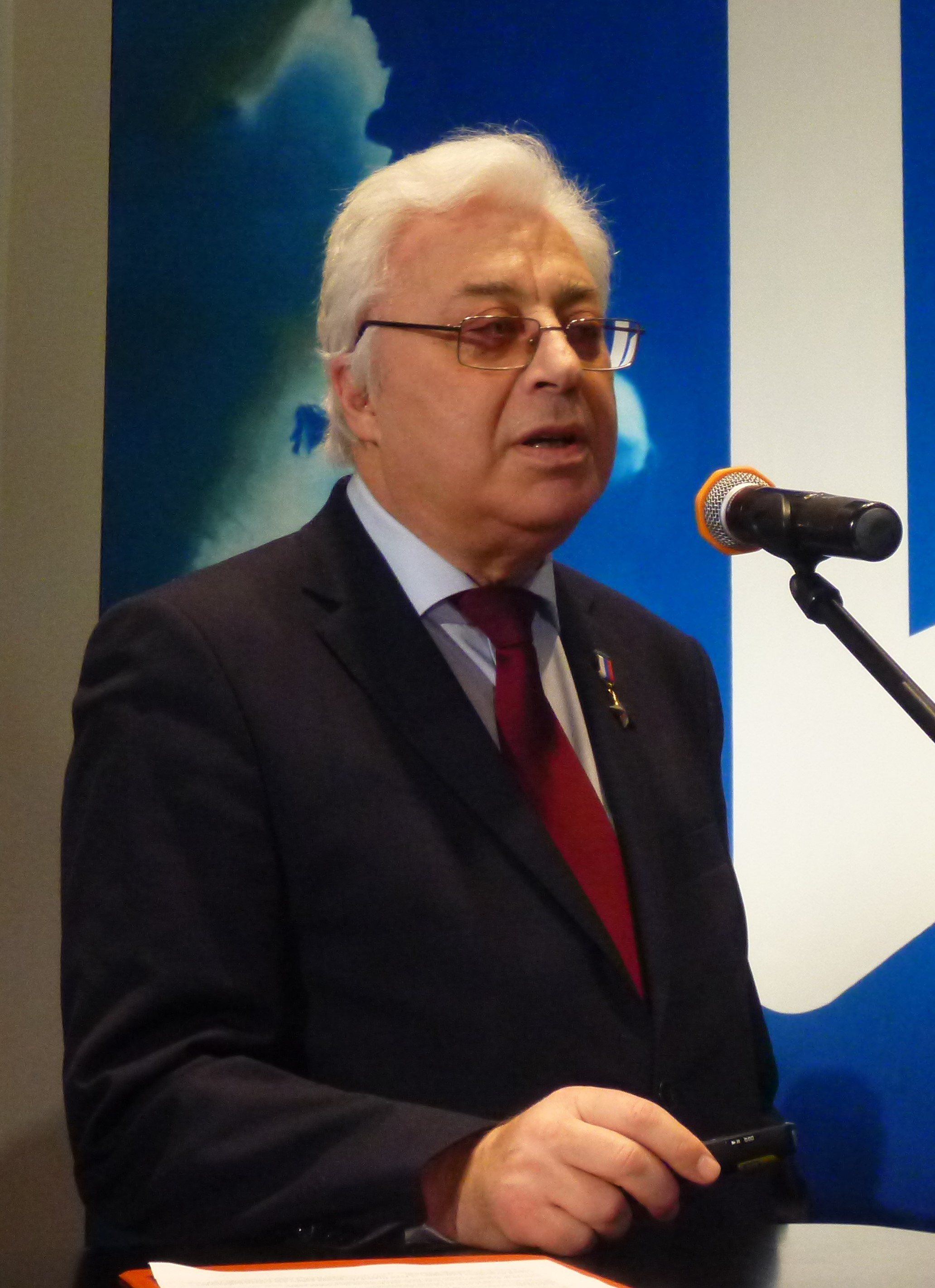 Юрий Михайлович Батурин 9 декабря 2019 года